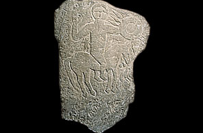 Stèle lybique découverte près de Tighzirt - datant du 4eme siècle avant J-C